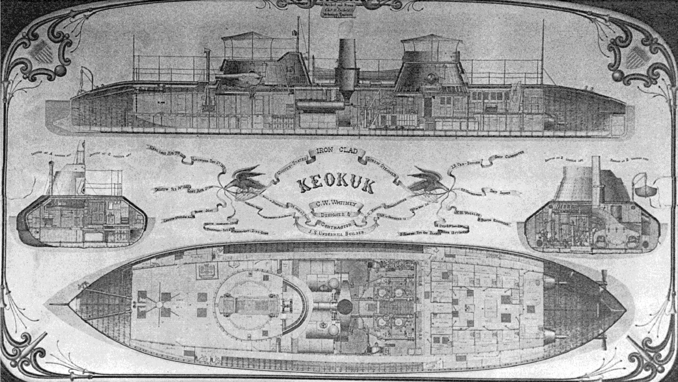 USS Keokuk